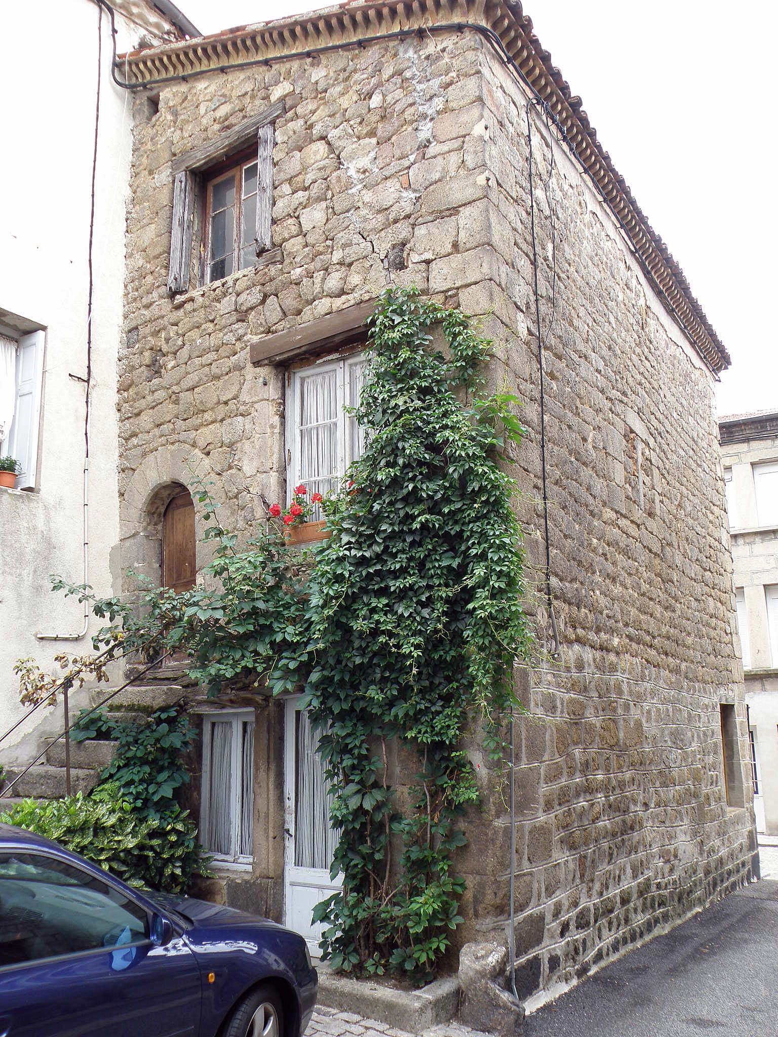 Monistrol-sur-Loire, dép. de la Haute-Loire, France (Auvergne). Maison à génoise dans la vieille ville.